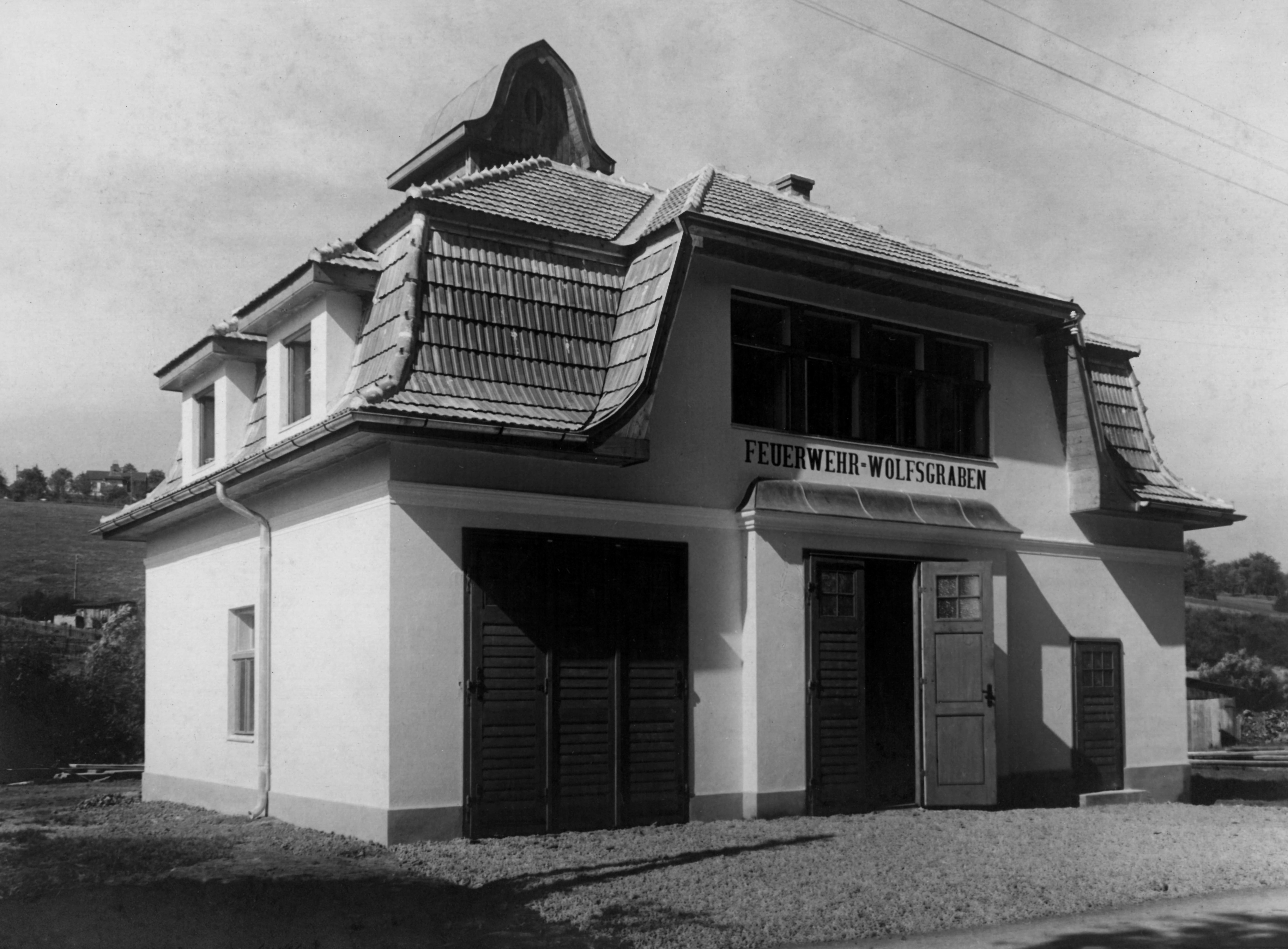 Fertiggestelltes Feuerwehrhaus Wolfsgraben im Jahr 1931